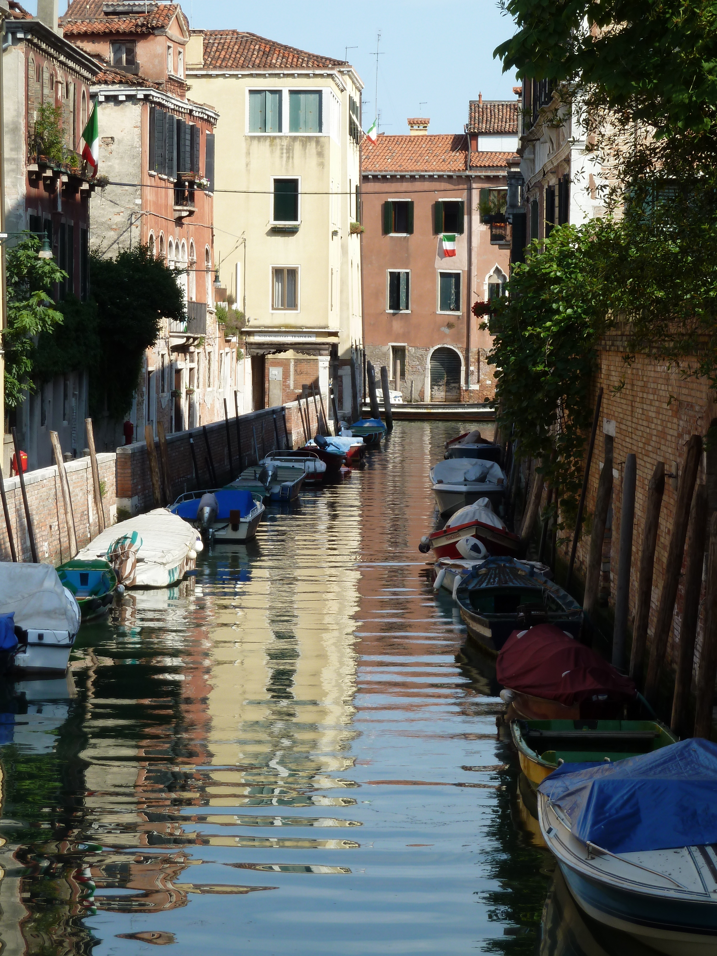 Rio del Trapolin (Venice)